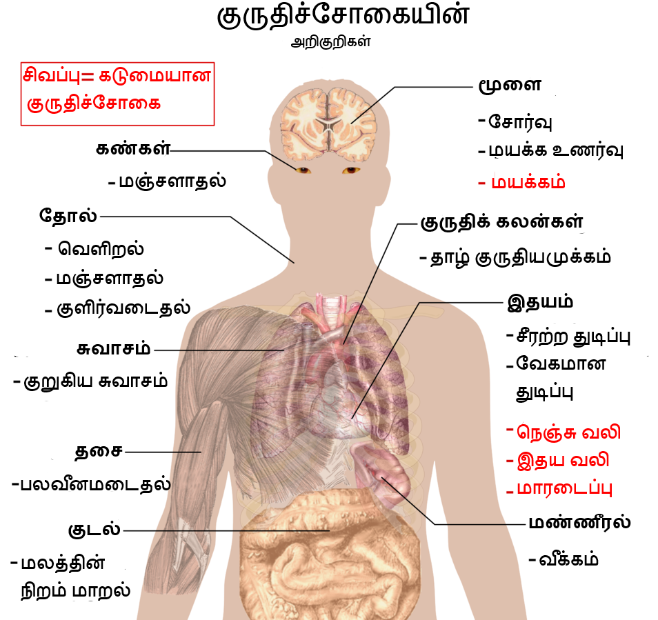 குருதிச் சோகையின் அறிகுறிகள்